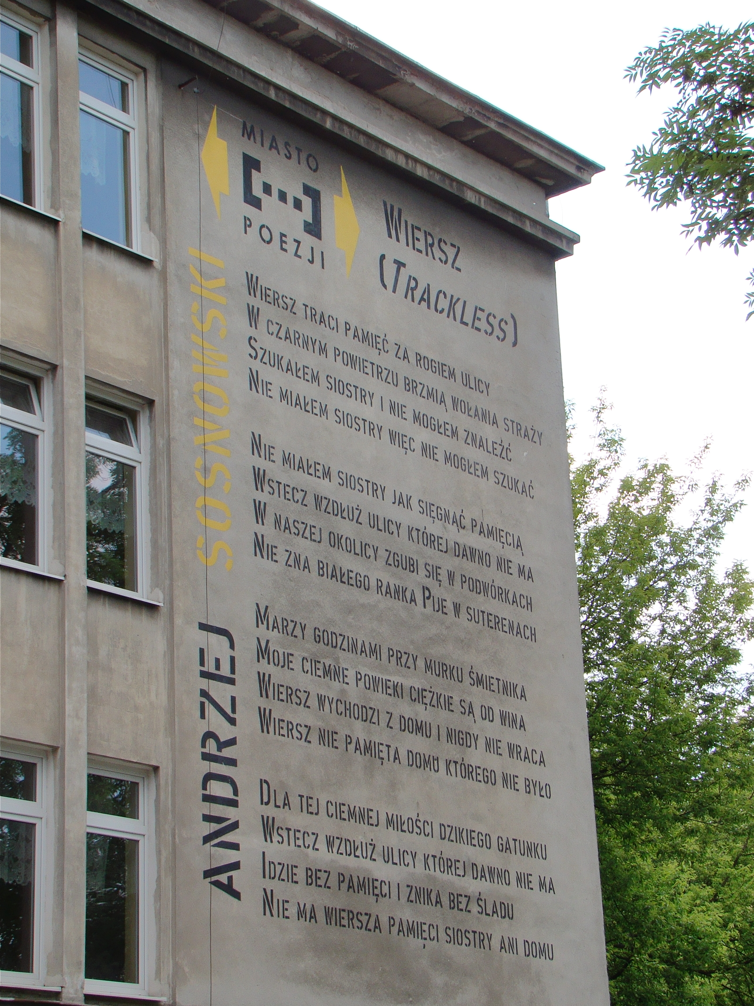 Lublin - ul. Lipowa 25 - Gimnazjum nr 9 - mural-wiersz - Andrzej Sosnowski